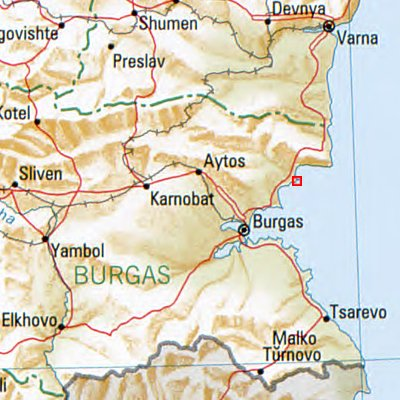 Nesebar - Lage des Ortes in Bulgarien